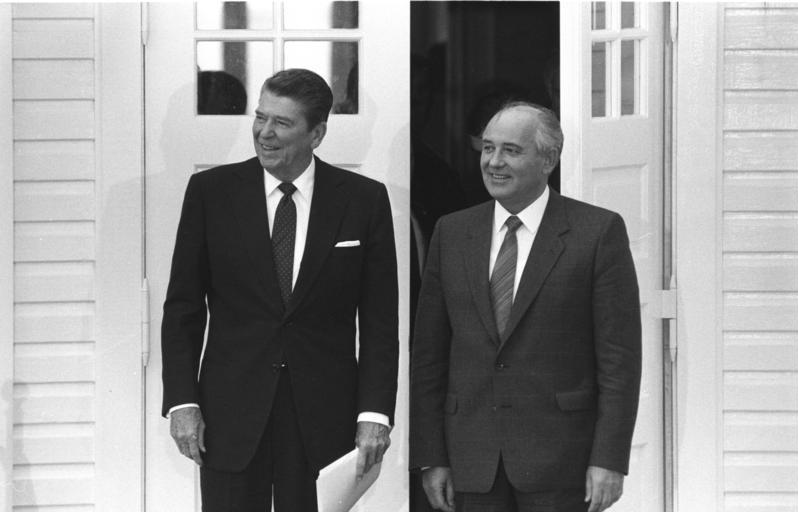 Reykjavik, Ronald Reagan, Michail Gorbatschow ADN-ZB / Koard / 12.10.86 / Island-Treffen Der Generalsekretär des ZK der KPdSU, Michail Gorbatschow, und der Präsident der Vereinigten Staaten von Amerika, Ronald Reagan (l.) zeigen sich nach ihrer dritten Unterredung im Gästehaus "Höfdi" in Reykjavik den internationalen Pressevertretern. Abgebildete Personen: Reagan, Ronald: 1911-2004; Schauspieler, 40. Präsident der Vereinigten Staaten, USA (GND 118598724) Gorbatschow, Michail: Präsident, Vorsitzender des Obersten Sowjets, Friedensnobelpreisträger, Sowjetunion